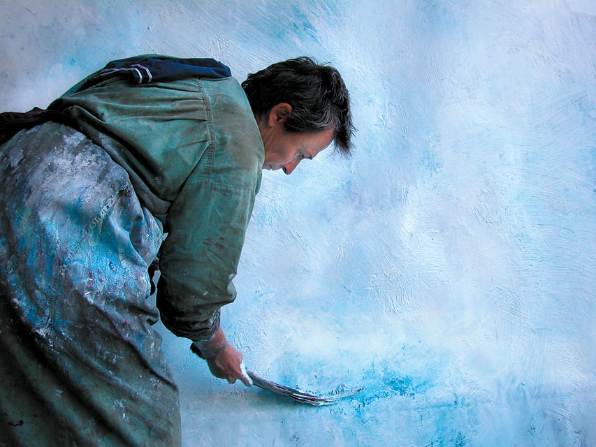 Lydie Arickx painting